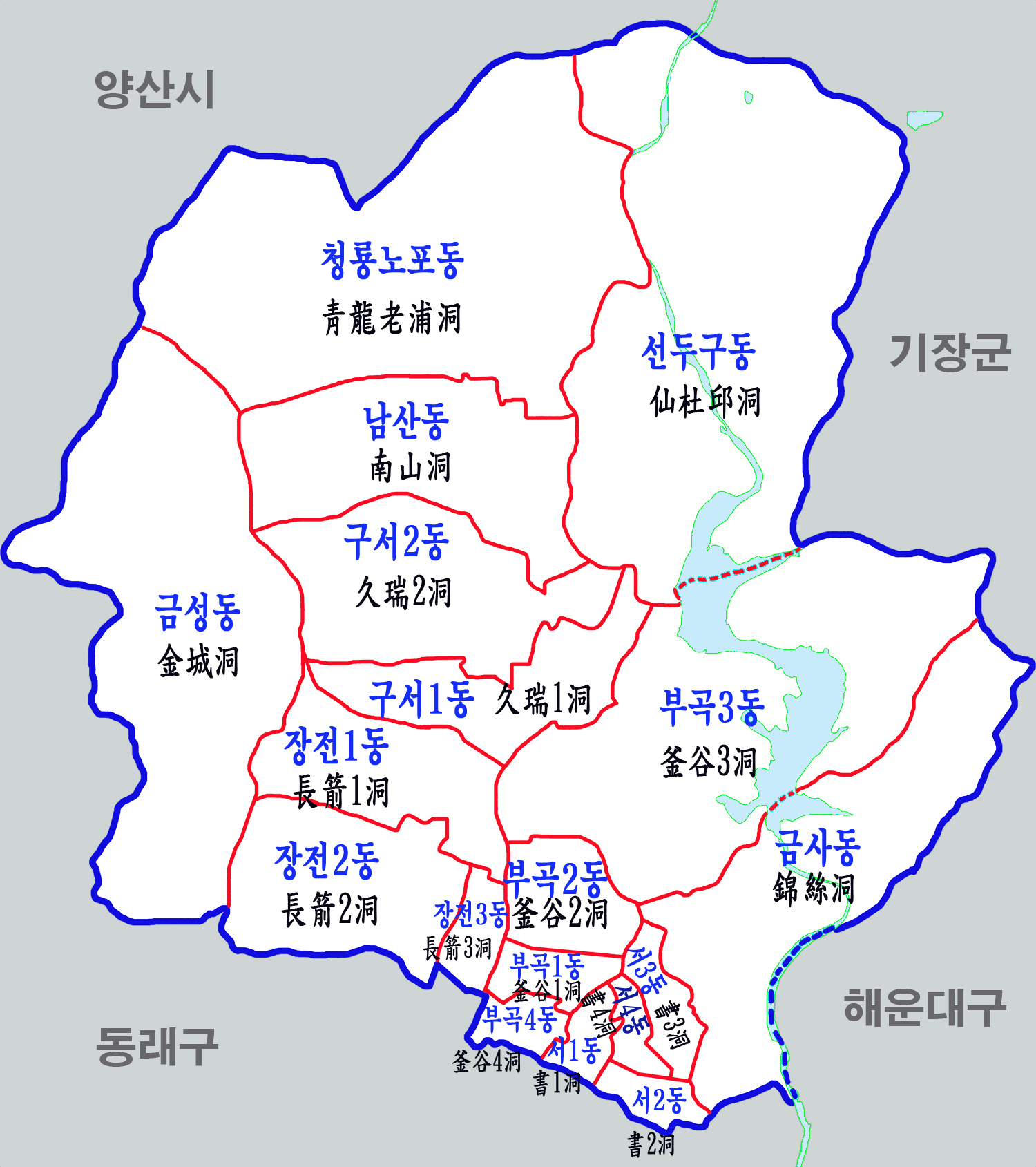 부산시 금정구 향정구역도